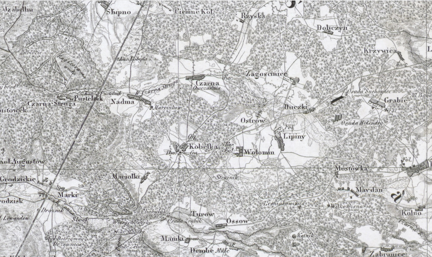 Topograficzna Karta Królestwa Polskiego, 1839 r., fragment , okolice miasta Wołomin.